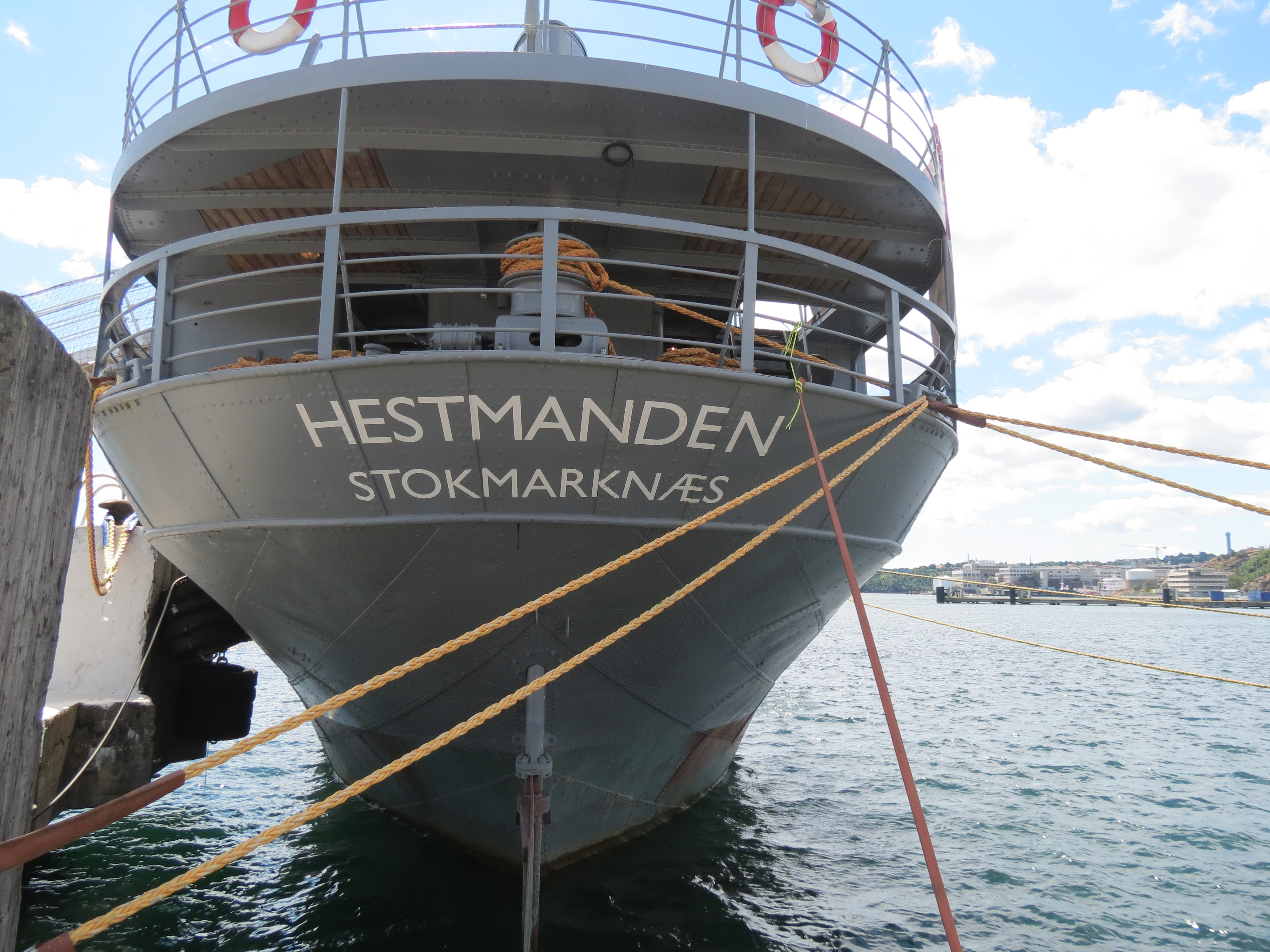 Veteran- og museumsskip / krigsminnesmerke